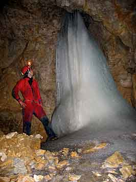 Grünbergalm-Eishöhle, "Eispalast", Ebensee, Salzkammergut, Österreich